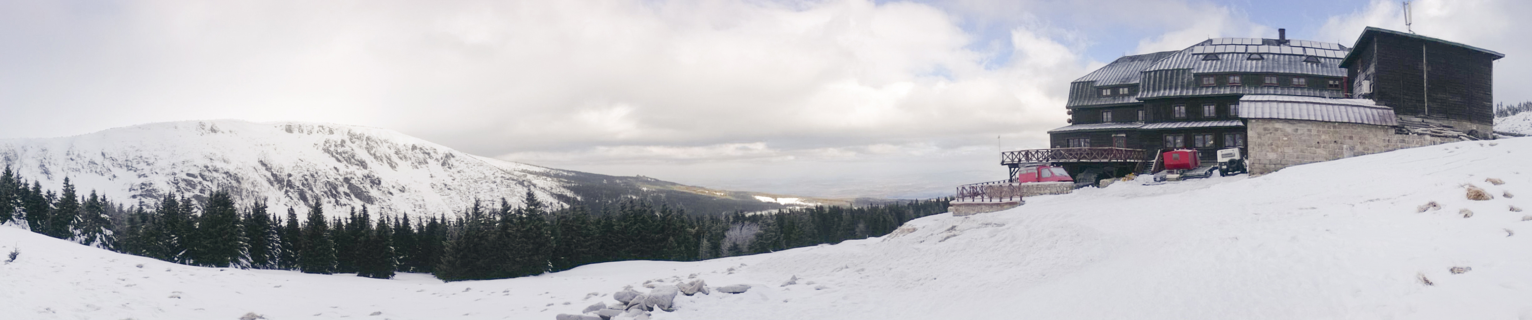 panorama z samotni